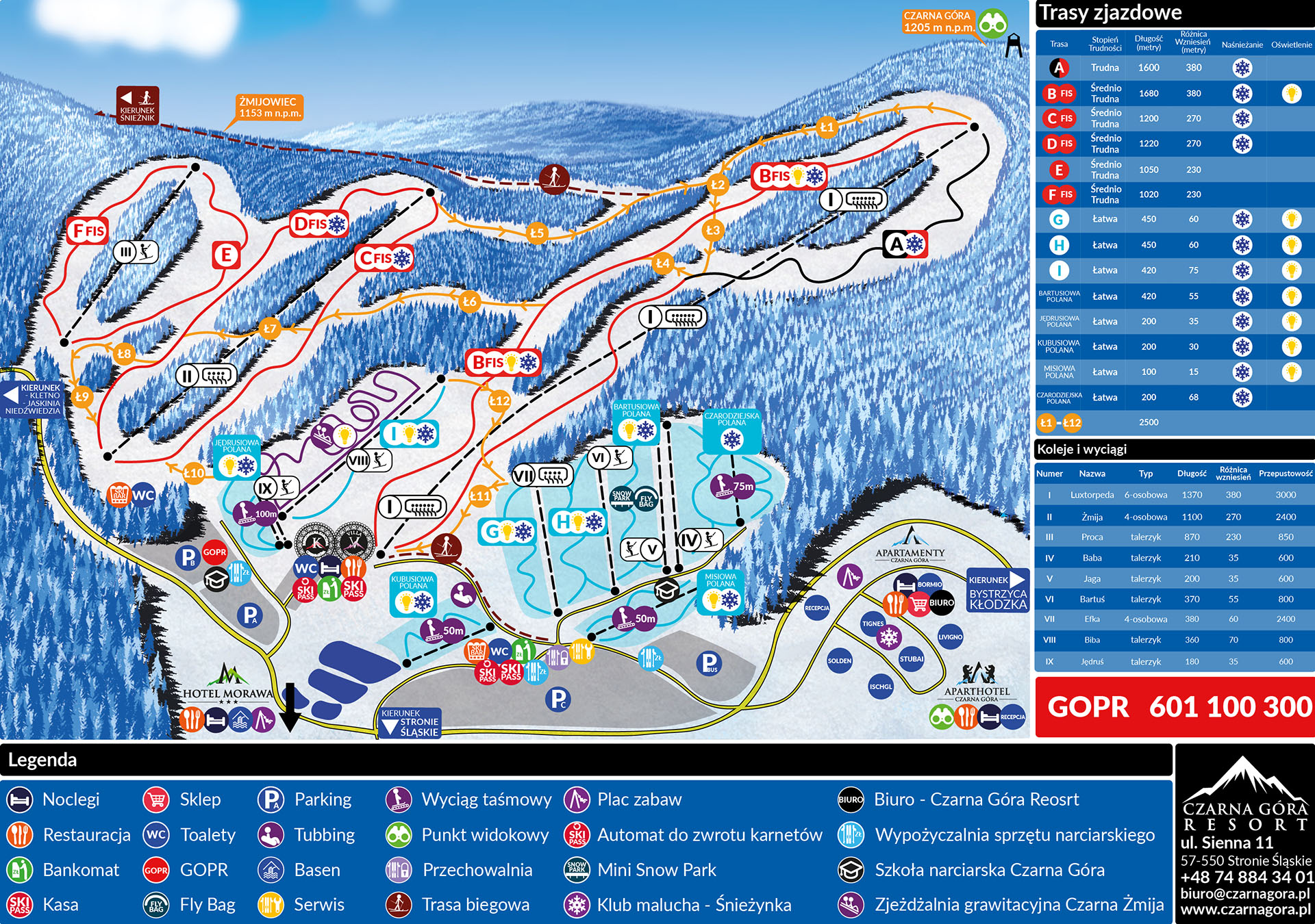 Sienna - mapa ośrodka narciarskiego Czarna Góra